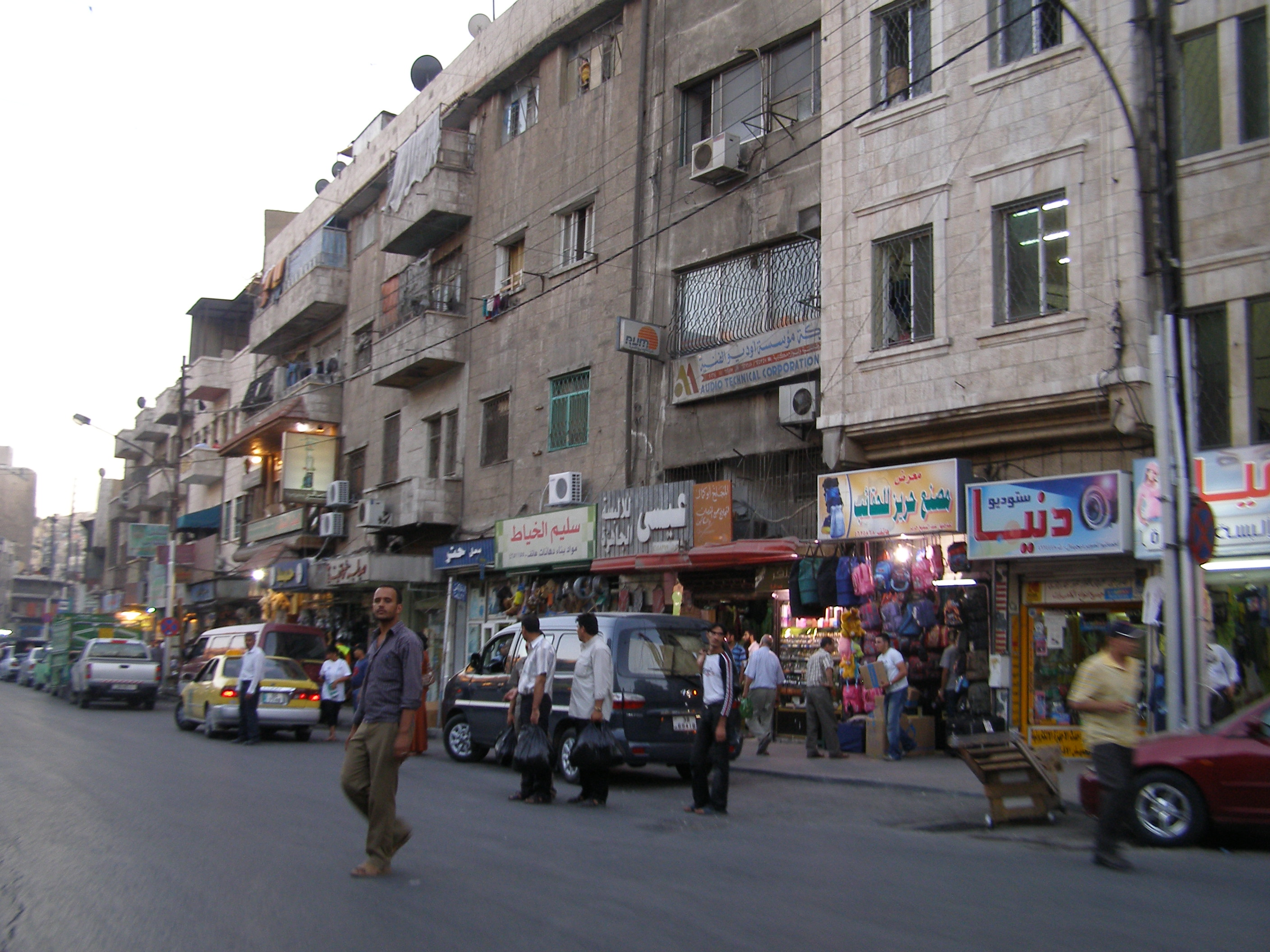 Talal Street Amman شارع طلال (وسط البلد) في عمّان